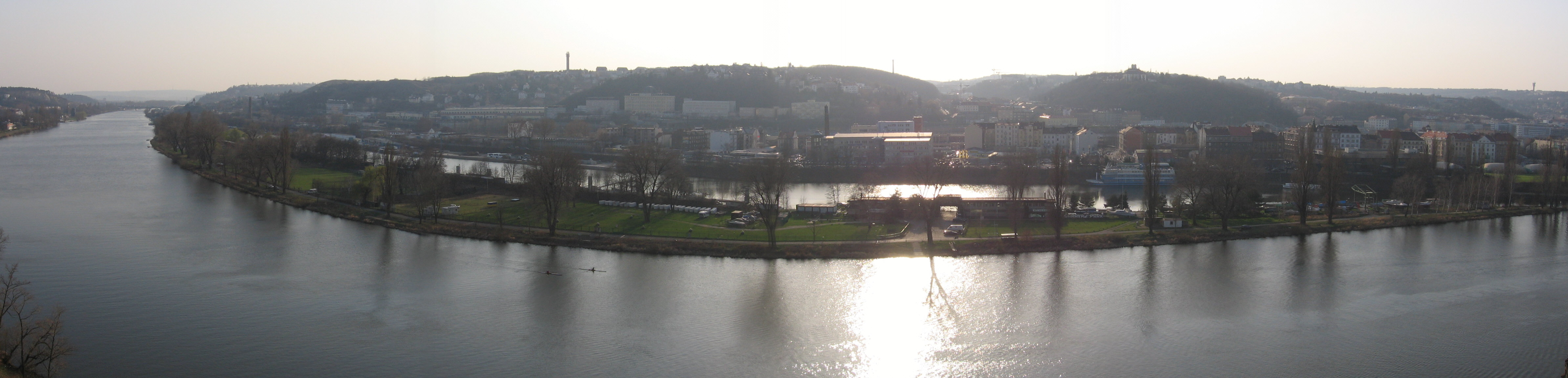 Ostrov Císařská louka, panorama (z Vyšehradu)